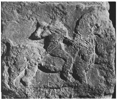 Pilier aux cavaliers trouvé dans l'oppidum d'Entremont en 1817 : le bas-relief représente la tête portée au cou du cheval d'un cavalier gaulois (musée Granet).